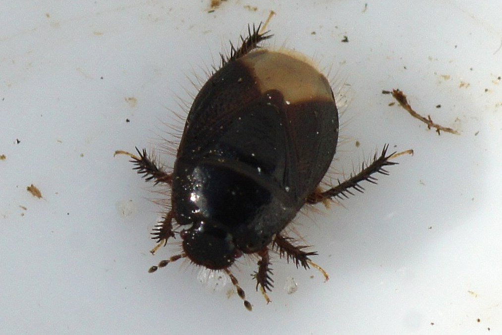 Borstelige doornwants